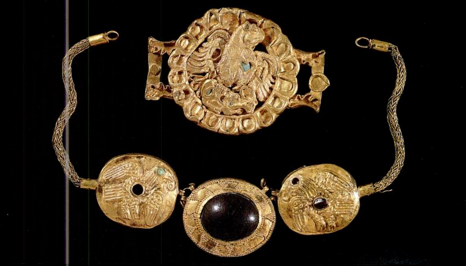 آثار کشف شده در نهاوند مربوط به خاندان کارن . تصویر از کتاب Ancient Near Eastern Art By Dominique Collon